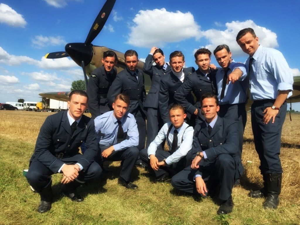 Krzysztof Kwiatkowski na planie filmu "Dywizjon 303"